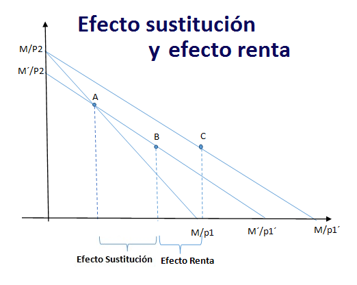 La cesta inicial del consumidor es A pero tras la reducción del precio del bien 1, la cesta se modifica a C. Esta modificación se subdivide en dos partes: de A-B que es el efecto sustitución y de B-C que es el efecto renta.